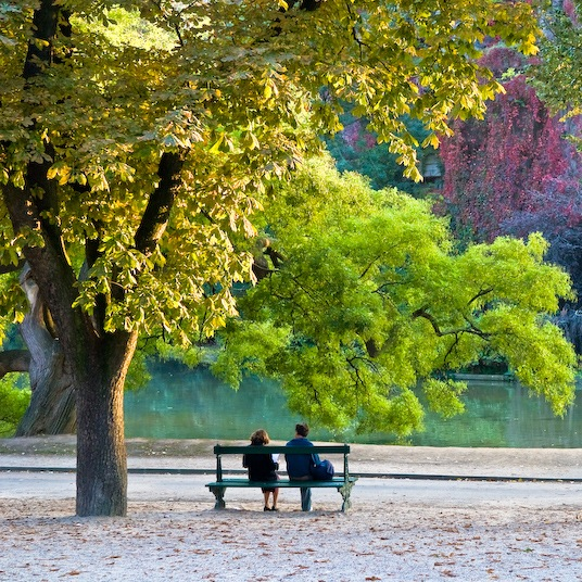 Buttes Chaumont